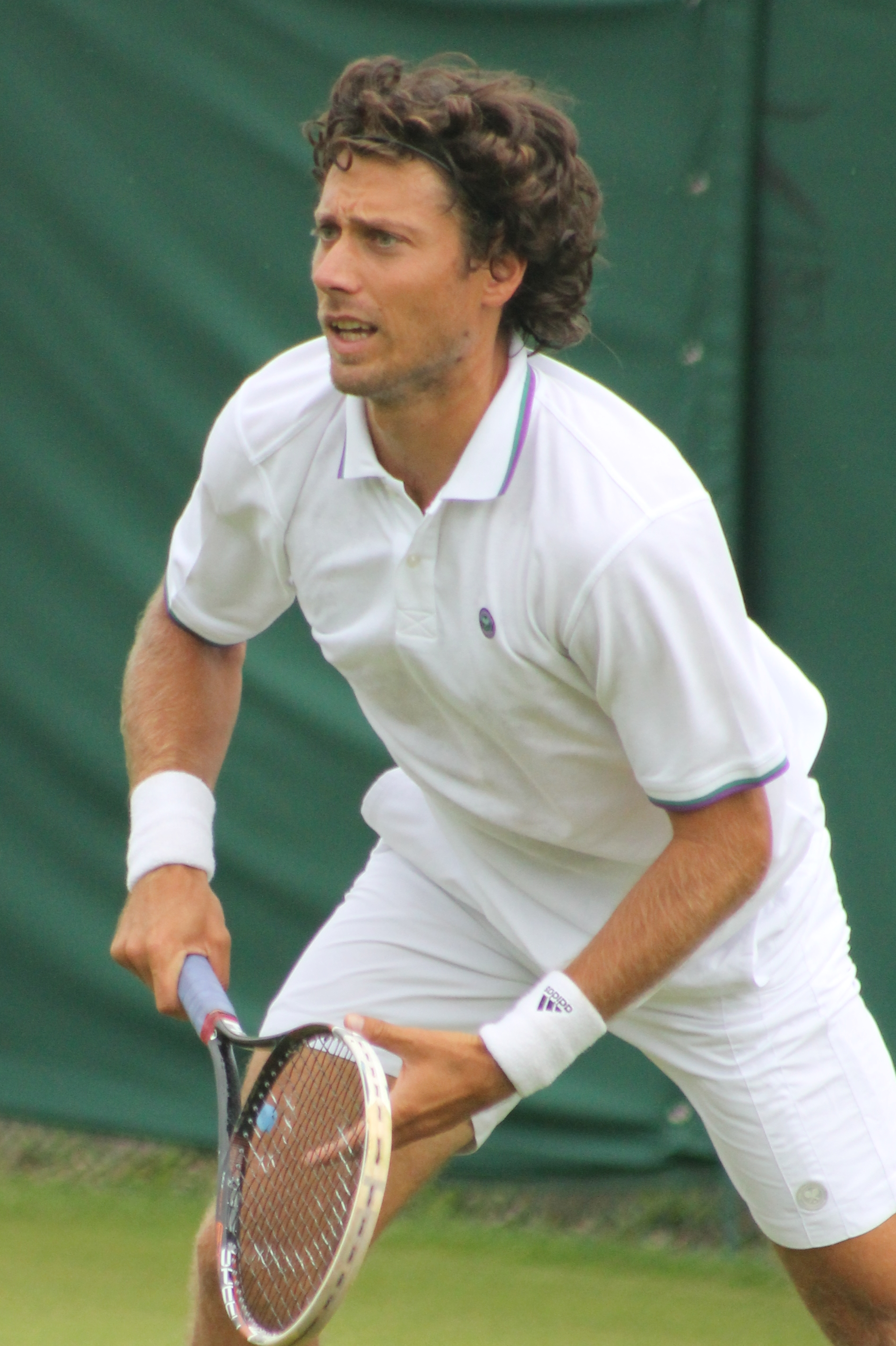 Sitak WMQ14 (10)